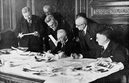 'De Staalmeesters' (naar vergelijking met schilderij Rembrandt). Ministerraad van het kabinet Colijn III in 1936.